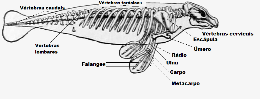 Anatomia esquelética dos Sirenios